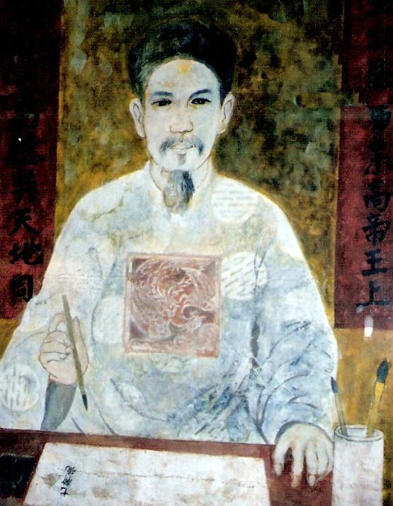 Tranh thờ Chu Văn An (1292 - 1370) trong Văn Miếu - Quốc Tử Giám tại Hà Nội.